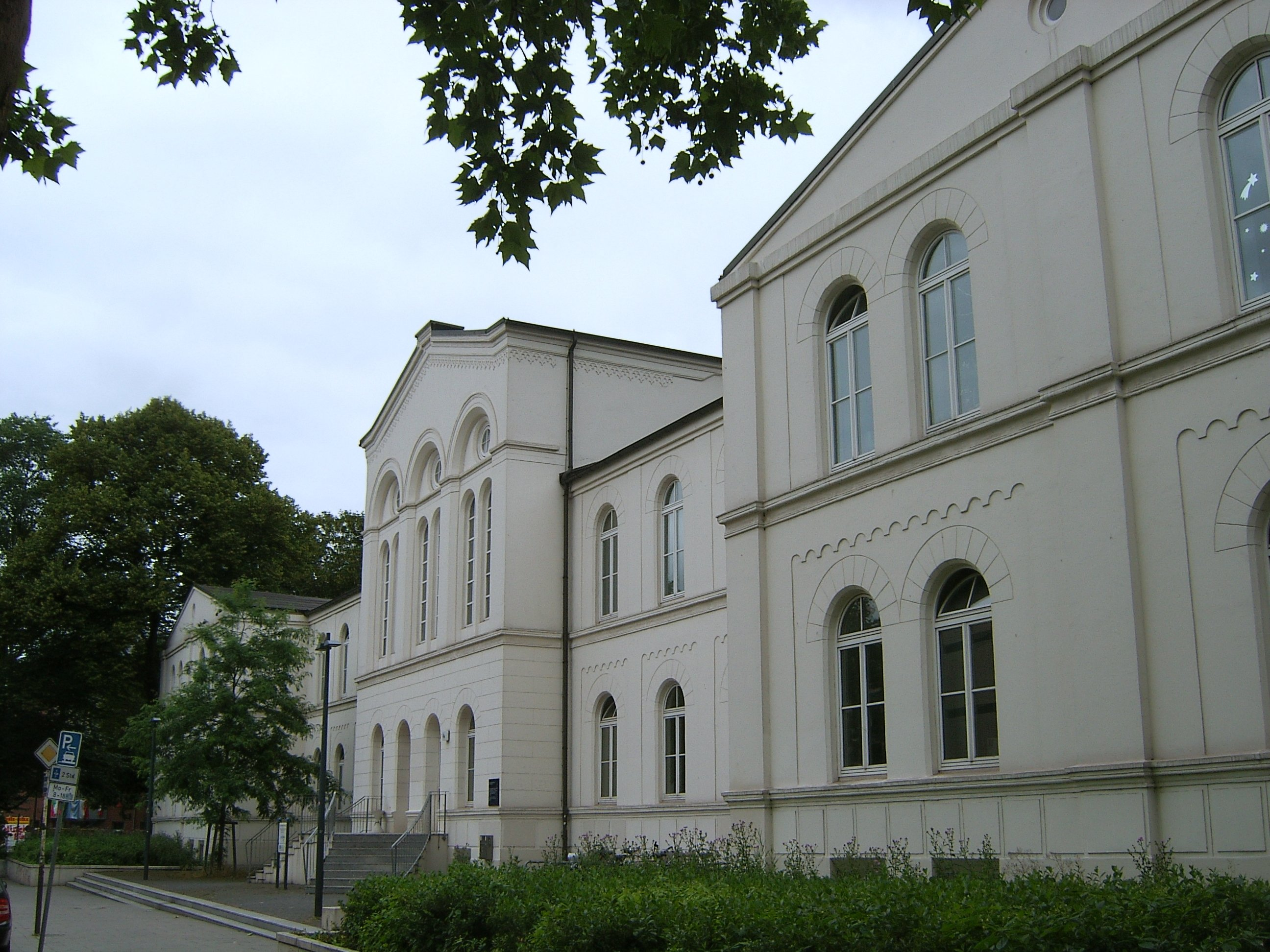 Bildbeschreibung: Hamburg, St.Pauli, ehemaliges Israelitisches Krankenhaus. Erbaut 1841-43 von Johann-Hinrich Klees-Wülbern. Fotograf: selbst Datum: 28.6.2006